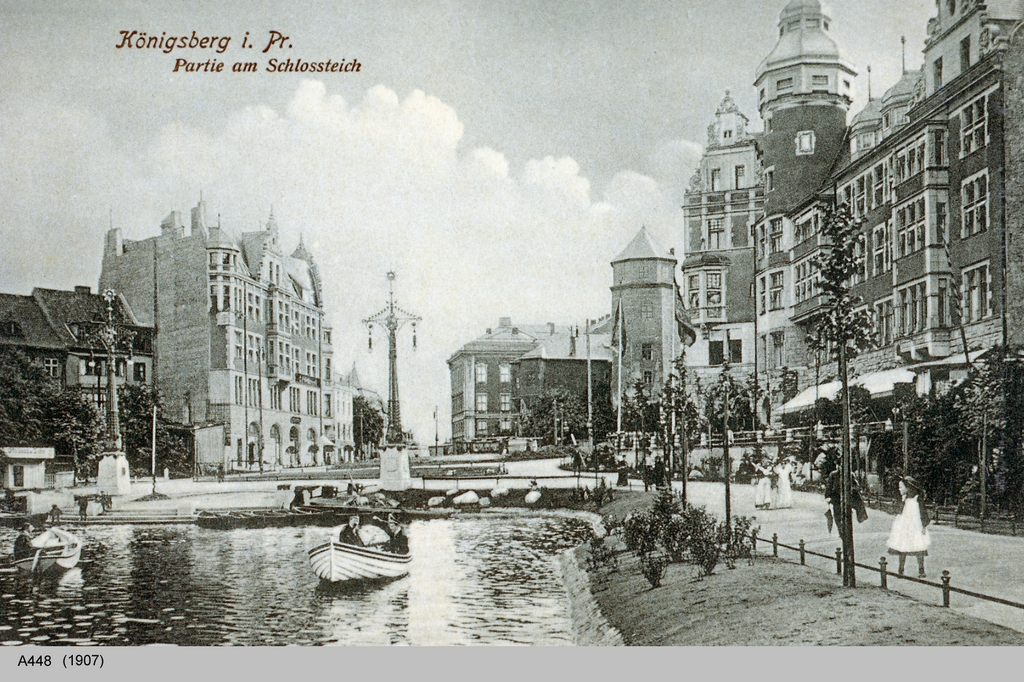 Königsberg